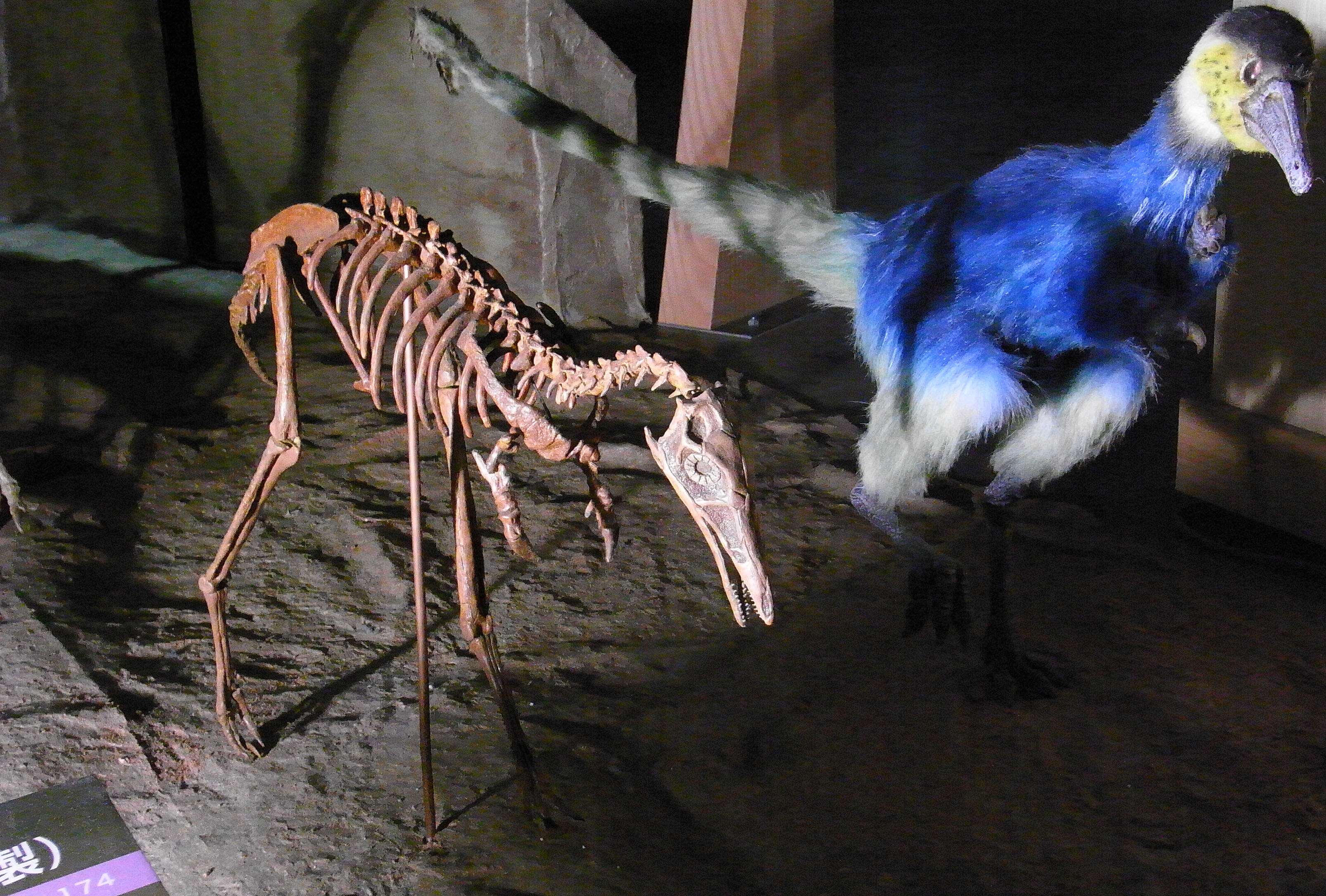 え・・・正面顔やばい。ファンシーすぎる。